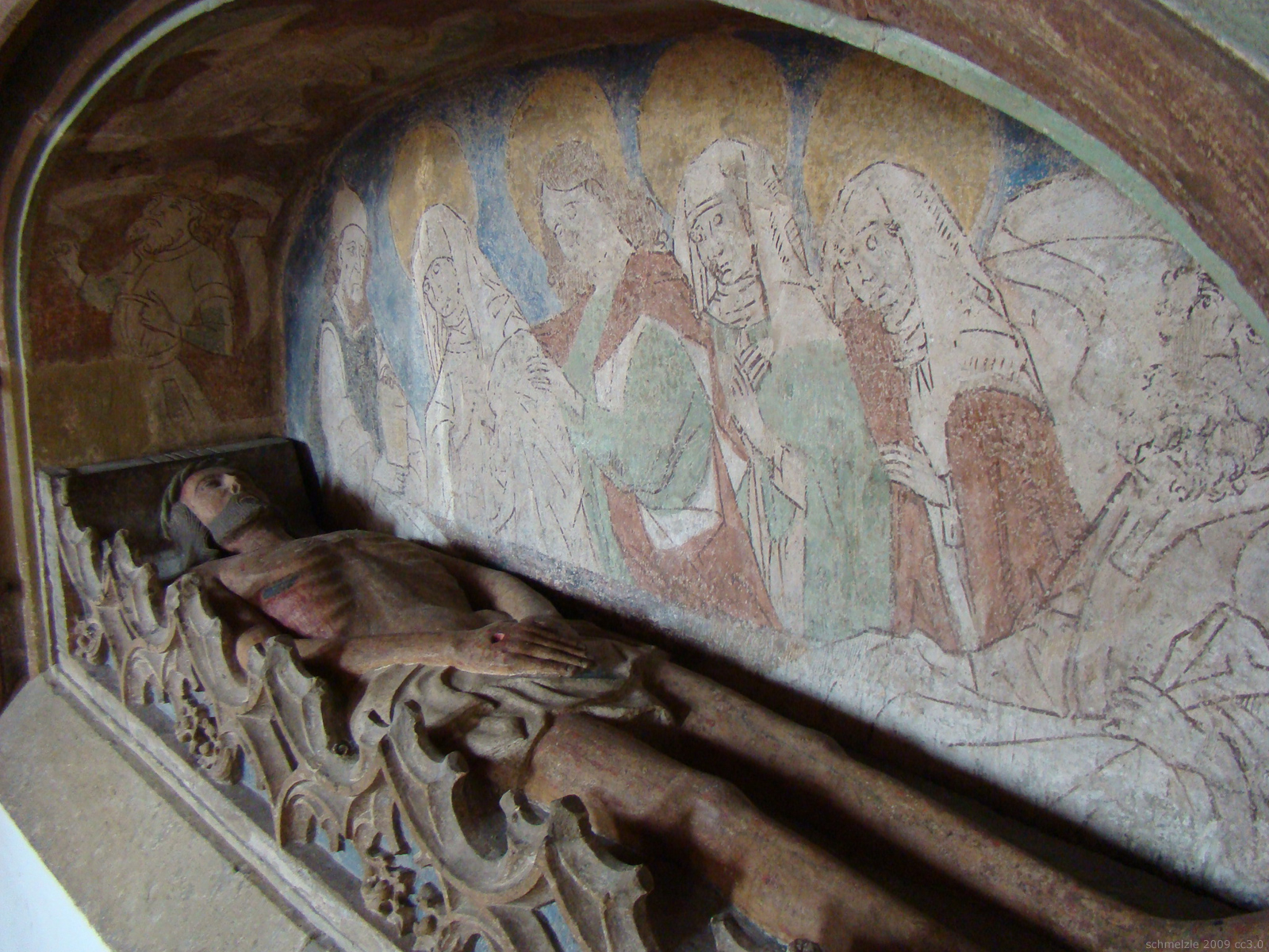 Detail aus der Stadtkirche St. Jakobus in Brackenheim: das sog. Heilige Grab.